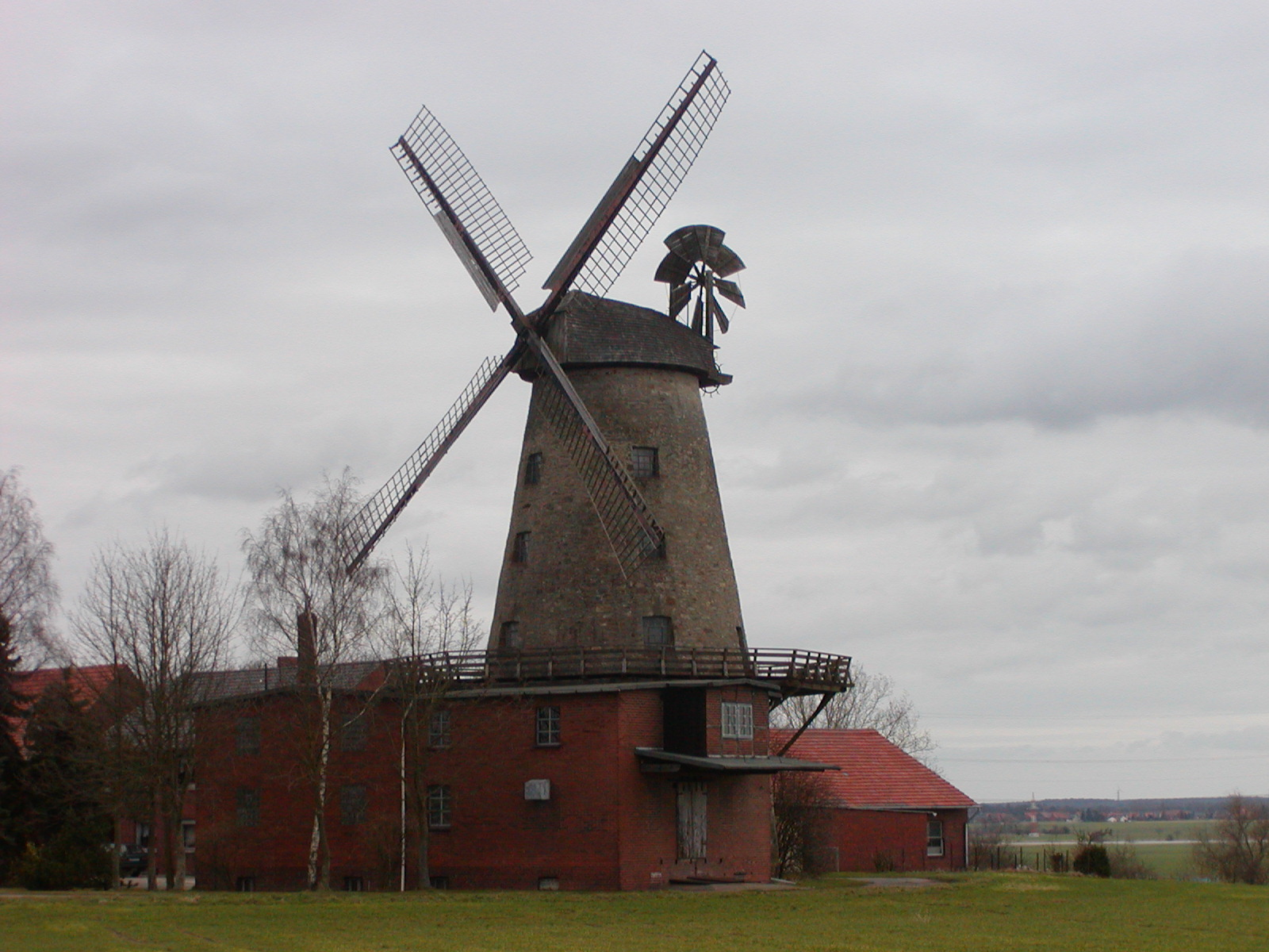 Pottmühle Petershagen Sonstiges: ...